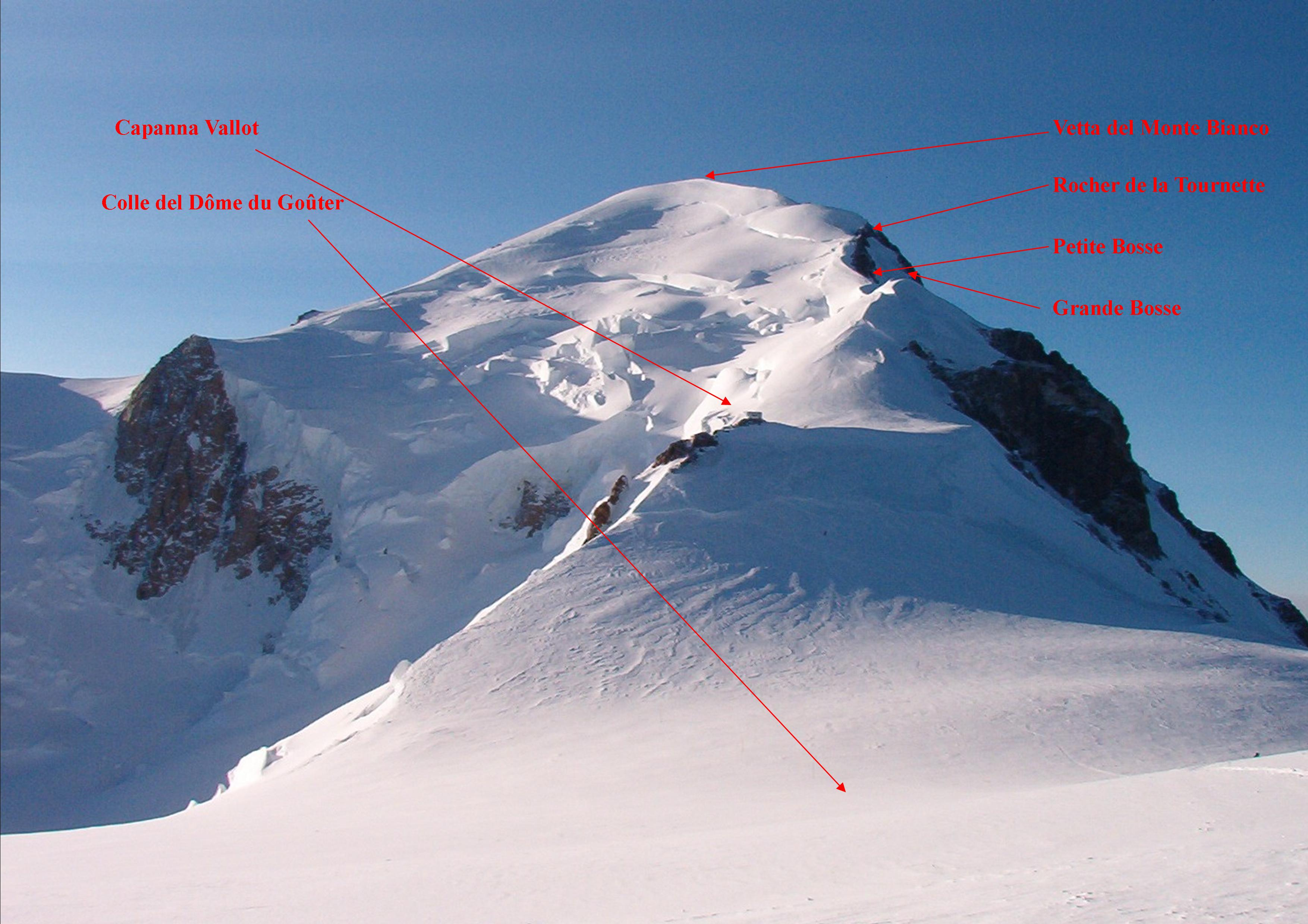 Vetta del Monte Bianco da Dome du Gouter con indicazioni